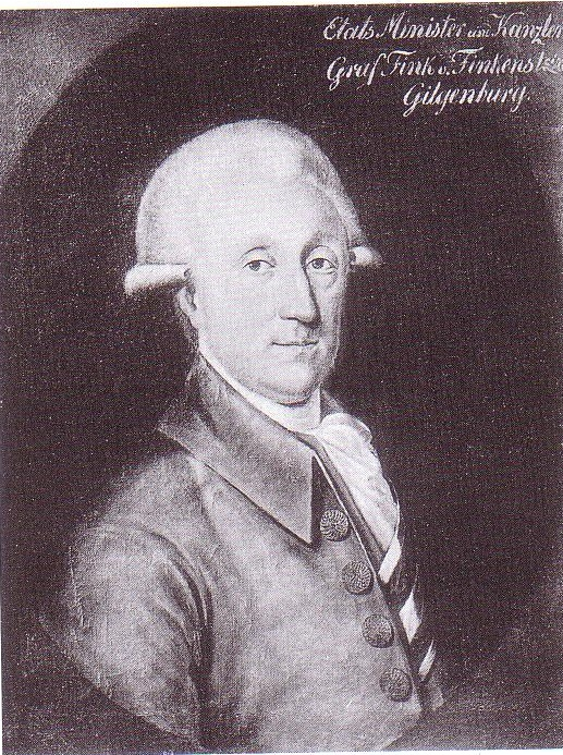 Porträt des Chefpräsidenten Grafen Ludwig Finck von Finckenstein (1743-1803)